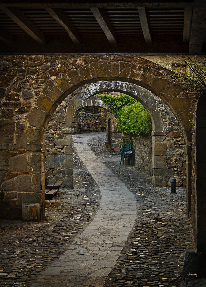 Una de las calles más populares de Potes